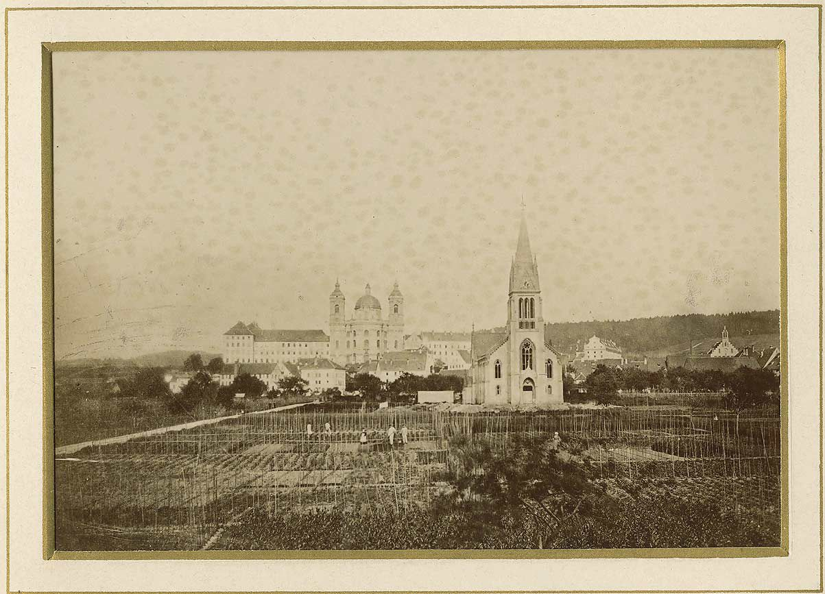 Evangelische Stadtkirche in Weingarten (Württemberg), im Hintergrund die Basilika